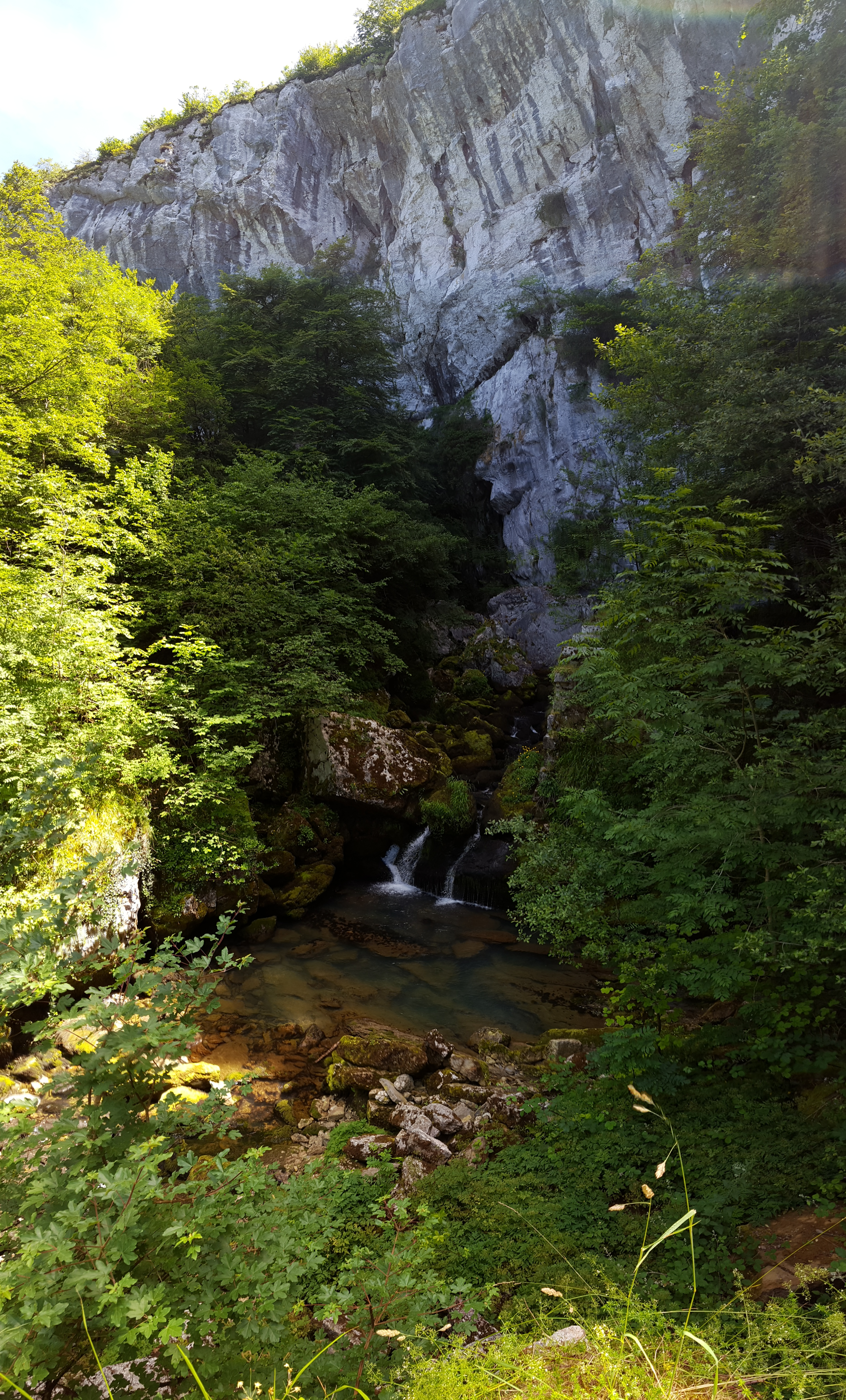 Larraun ibaiaren iturburua Iribas-en Nafarroan